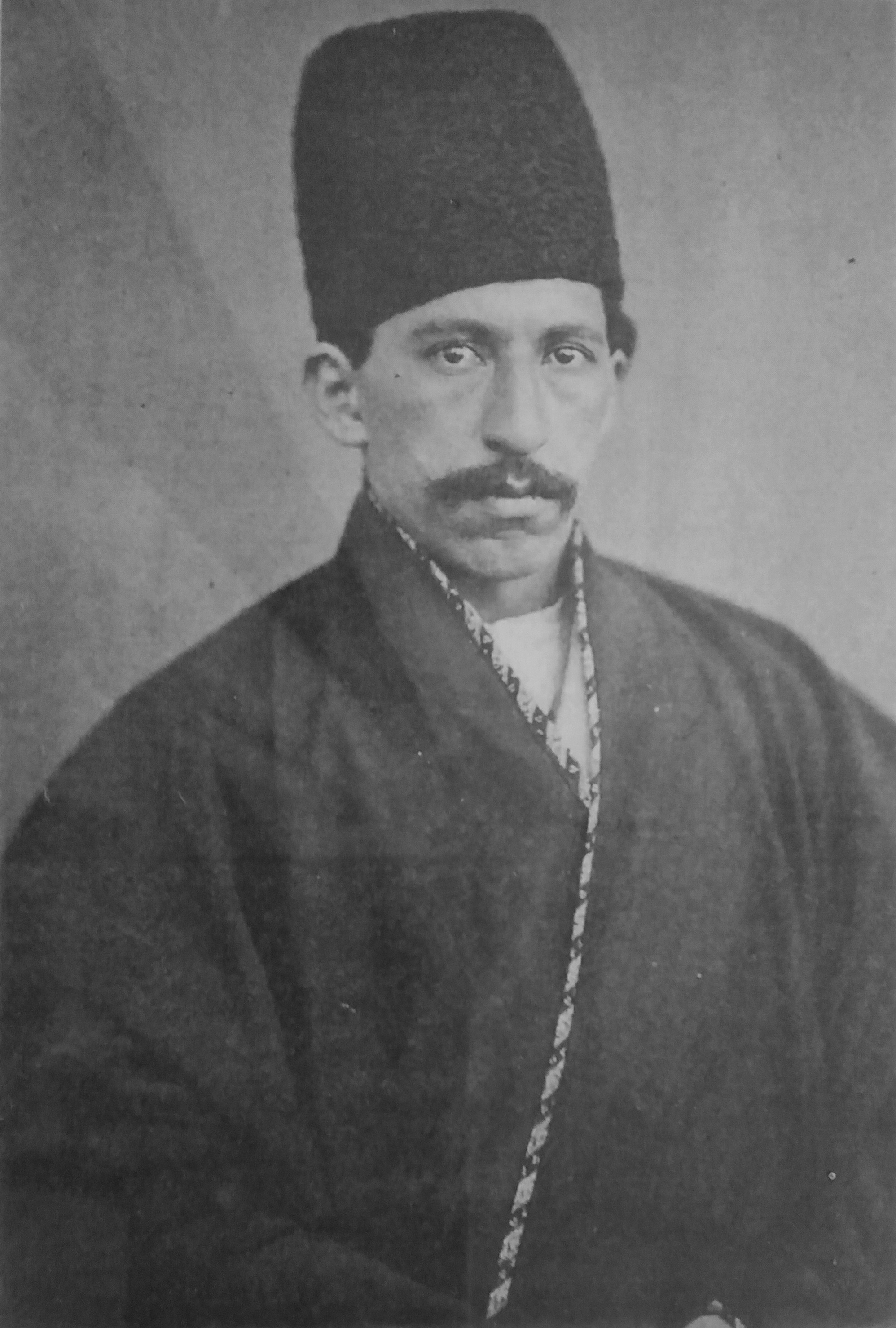 میرزا باقر صدیق‌الدوله پسر میرزا محمدرضاخان صدیق‌الدوله